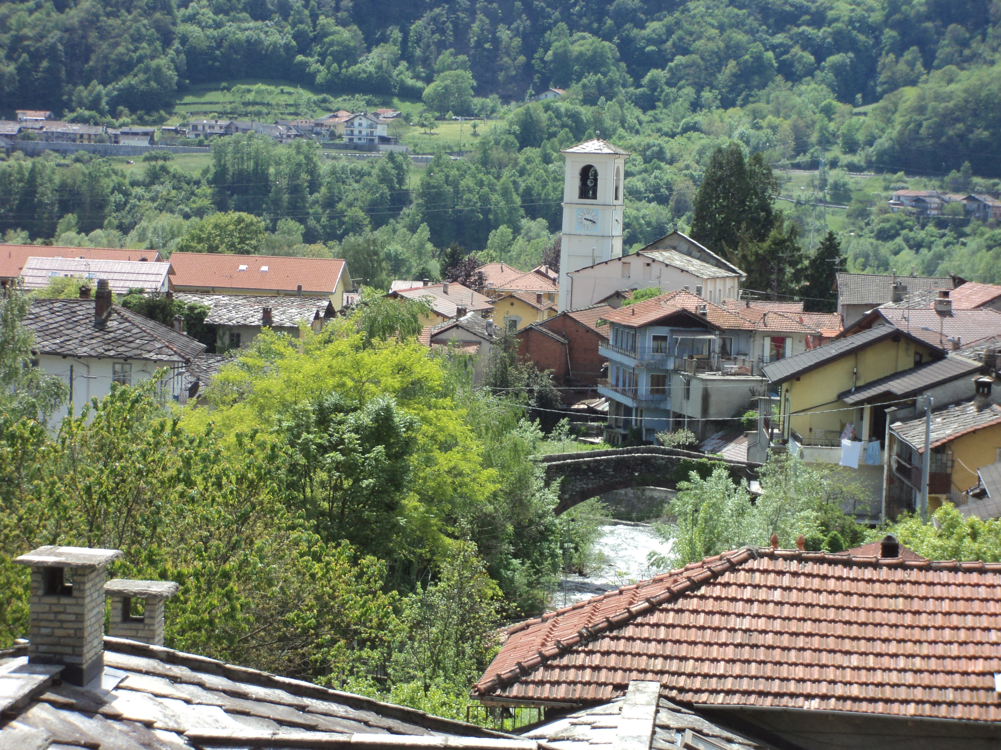 Panorama di Dubbione (frazione di Pinasca) con in primo piano il cosidetto Ponte di Annibale - provincia di Torino